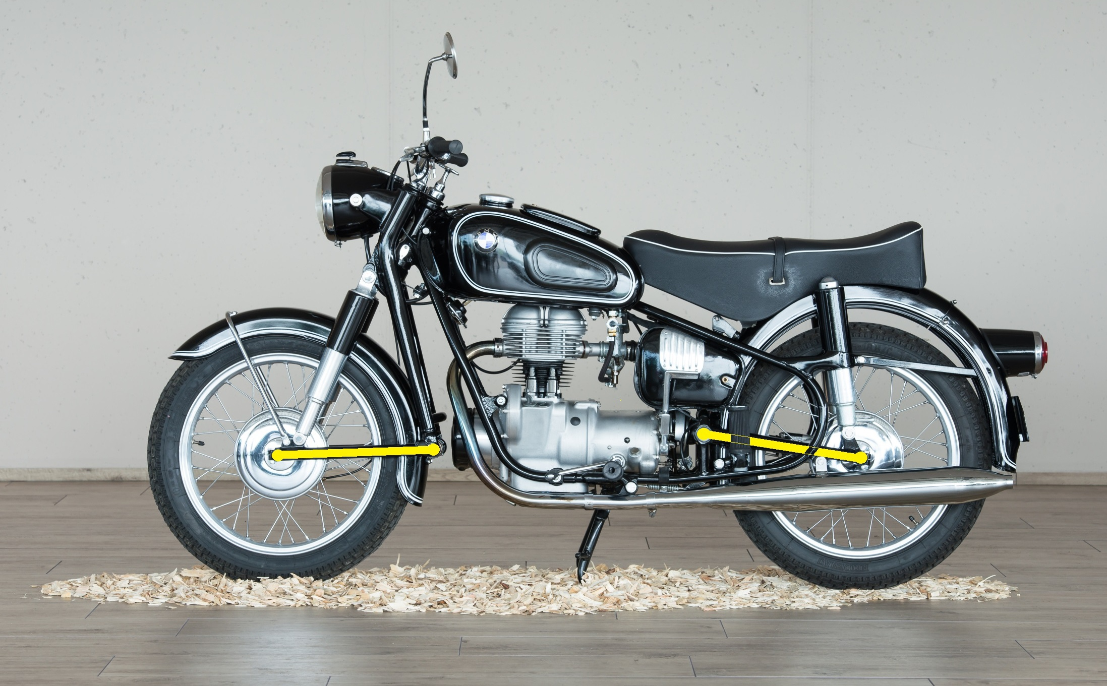 Motorrad der Marke BMW, R26. Oldtimer